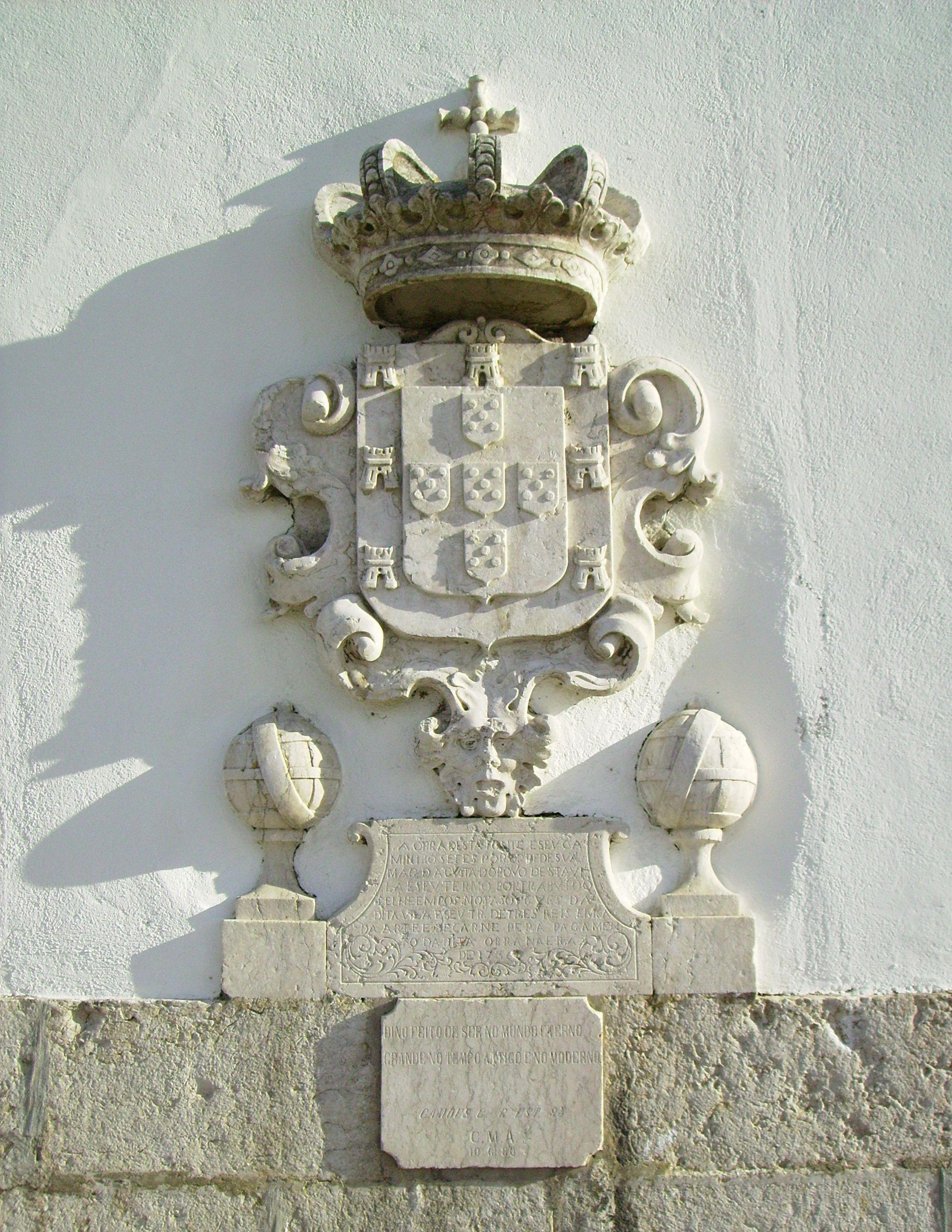 Autore: Massimo De Maria Descrizione: lapidi Licenza: CC 2.0